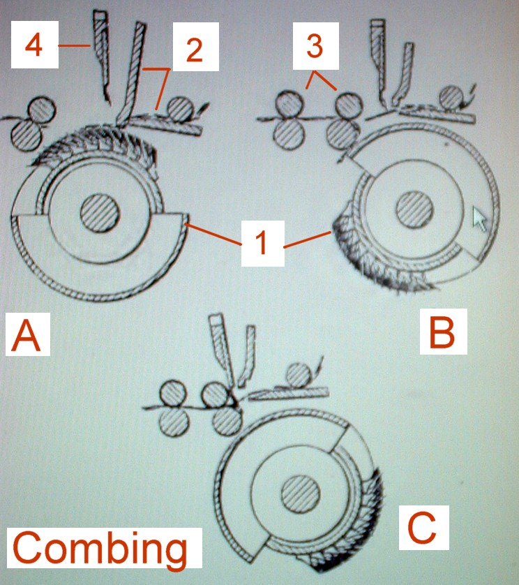 Schema: 3 Phasen des Kämmens